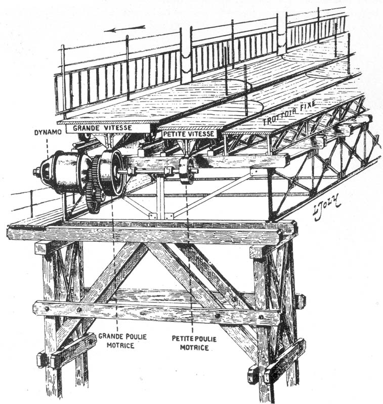 Illustration ; L. Joly , Sonderausgabe der Zeitschrift "Illustration" zur Weltausstellung vom 14. April 1900